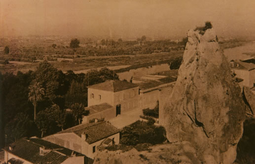 Terme e Nonna di Uliveto Terme